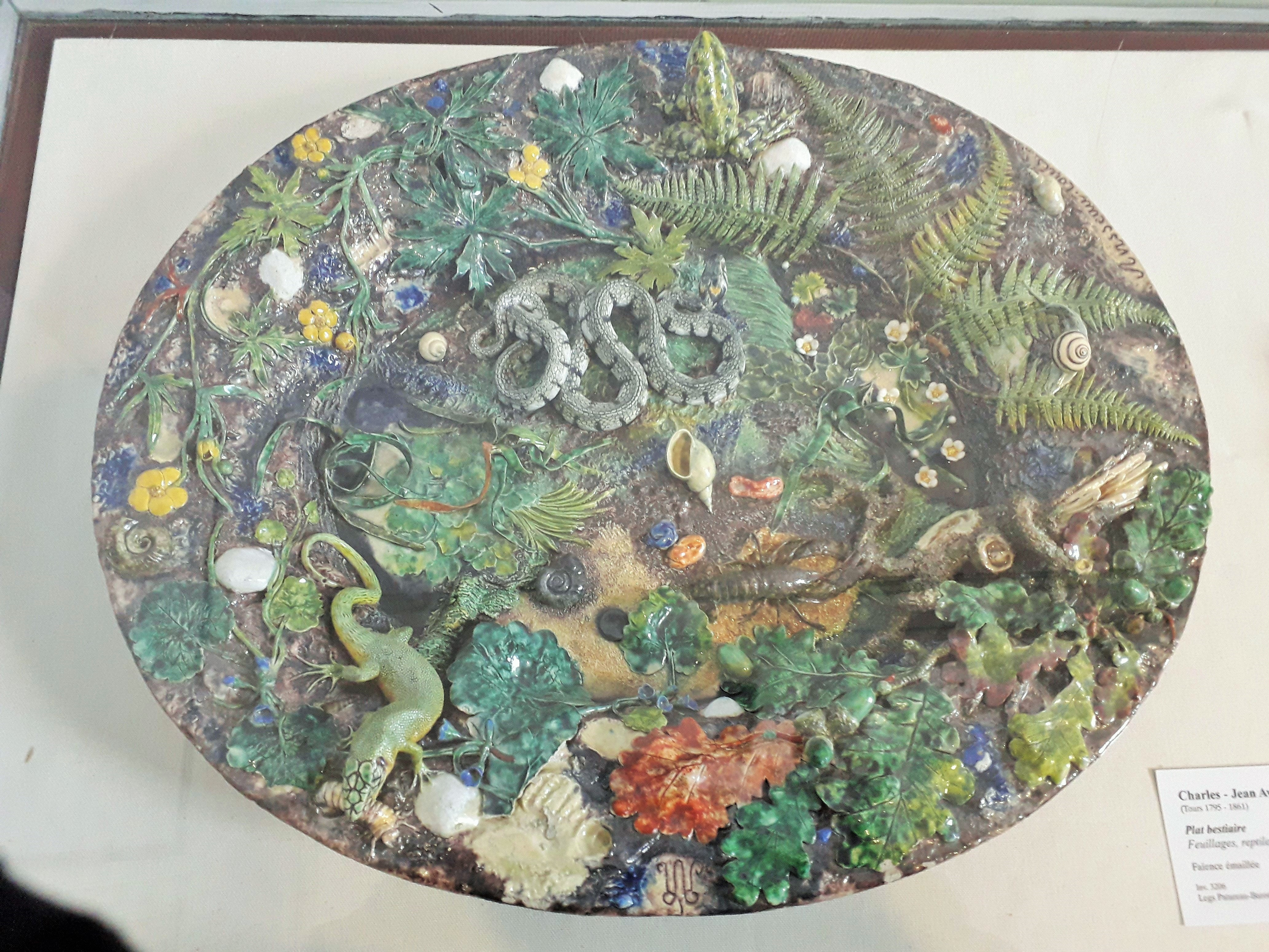 Plat bestiaire. Feuillages, reptiles, coquillages. Faïence émaillée. Charles-Jean Avisseau (Tours 1795-1861). XIXe siècle. Musée Bertrand, à Châteauroux, dans l'Indre, en France. Inv. 3206. Legs Patureau-Baronnet, 1922.